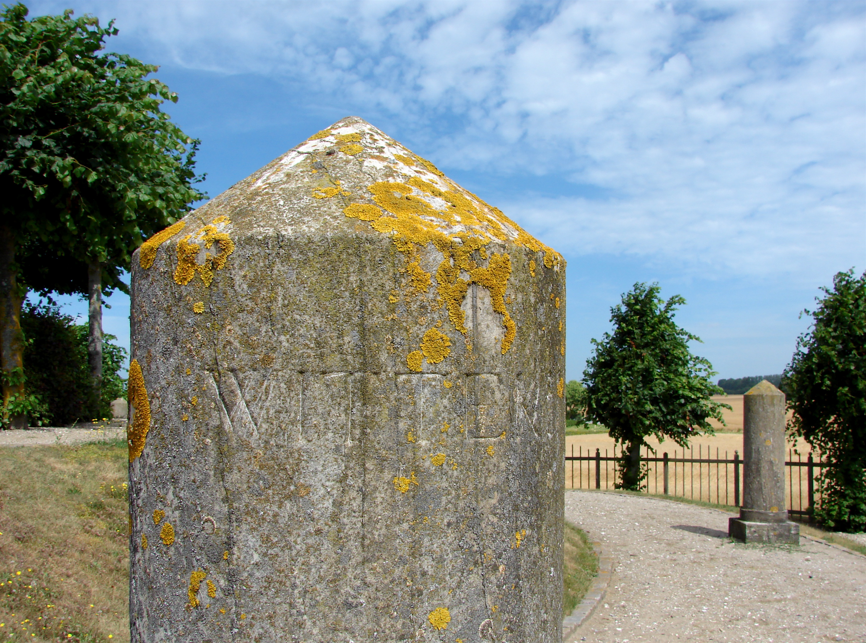 Detalje fra kegleformet støtte af norsk marmor med Wittekinds (Widukind) navn, Johannes Wiedewelt, Julianehøj, Jægerspris, Hornsherred